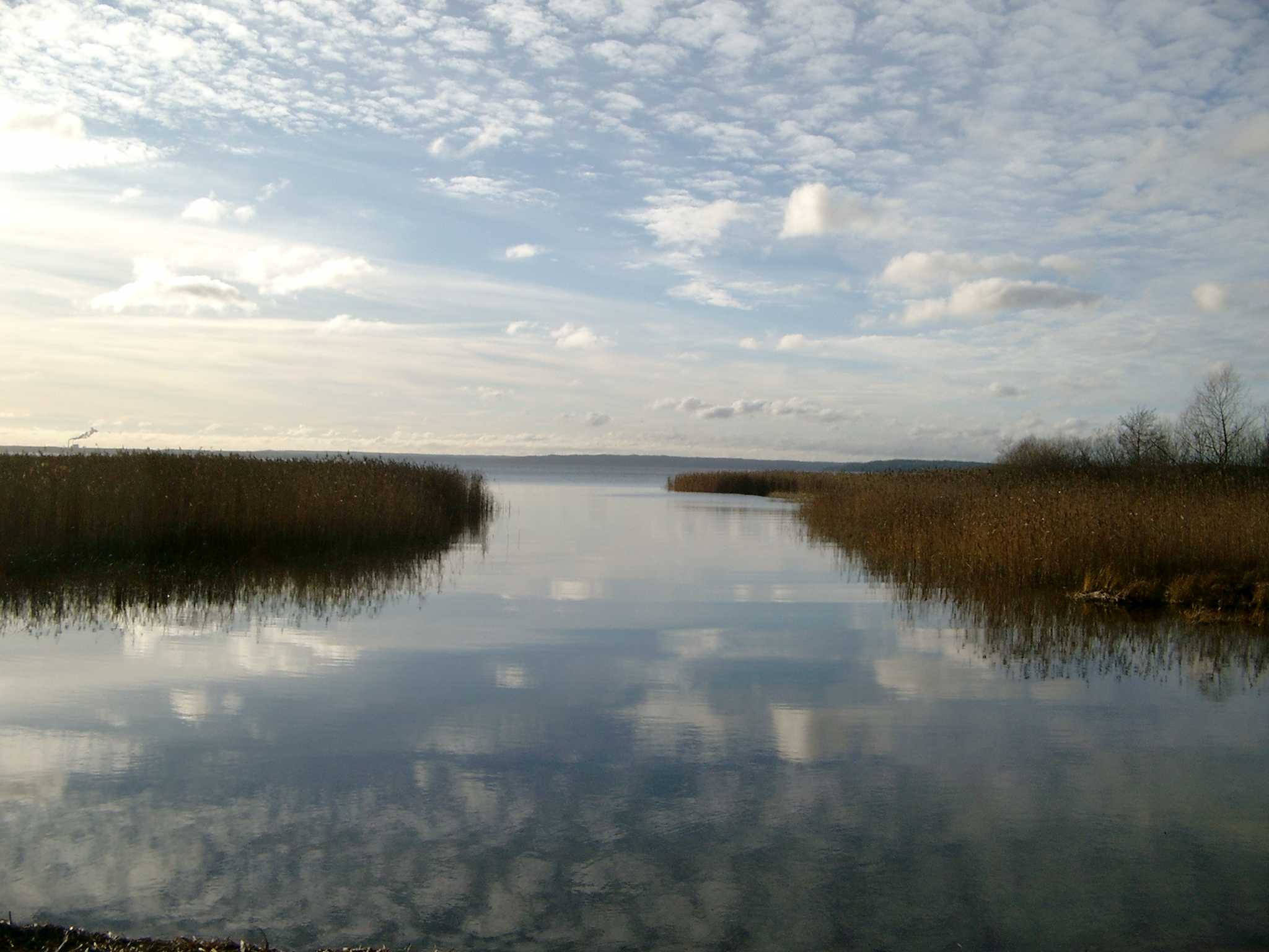 Der See Glan vom Badeplatz in Svärtige aus gesehen.